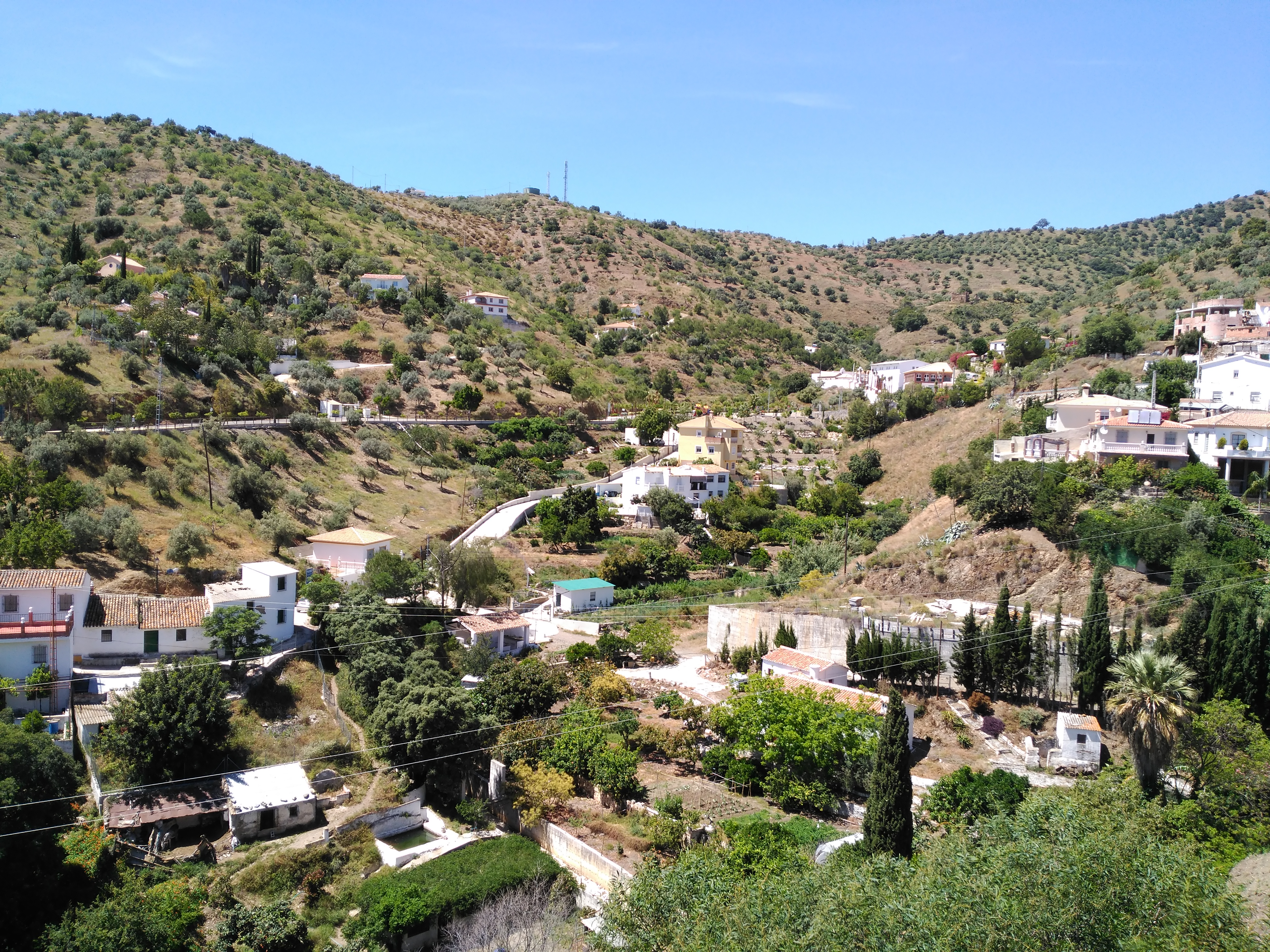 Vistas desde Totalán (Málaga)